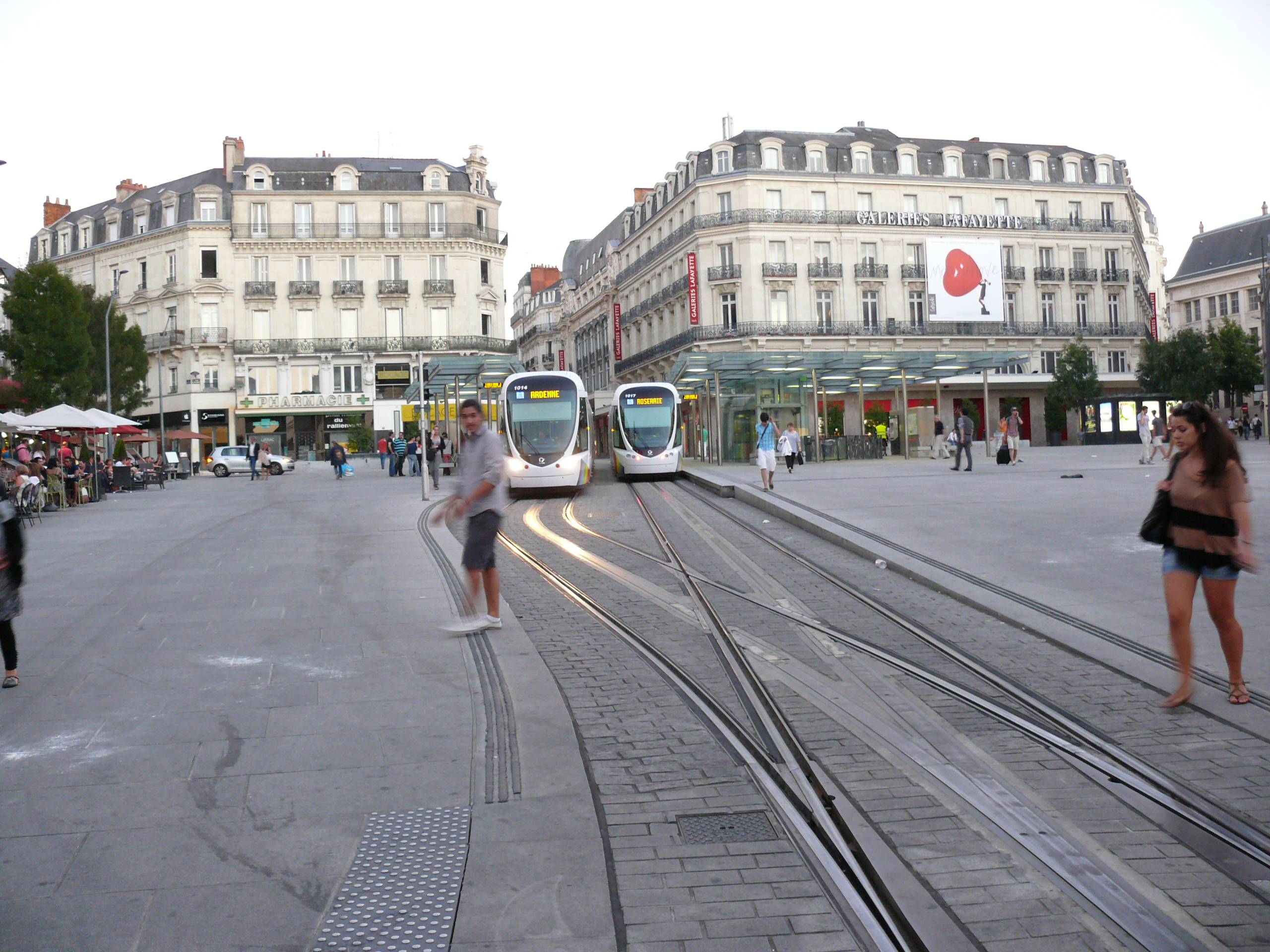 Abords de la station Ralliement du Tramway d'Angers. L'aiguillage permet de donner accès à la section à voie unique de la rue de la Roe. Noter la bande métallique au centre de la voie, qui est la partie visible du système d'alimentation par le sol